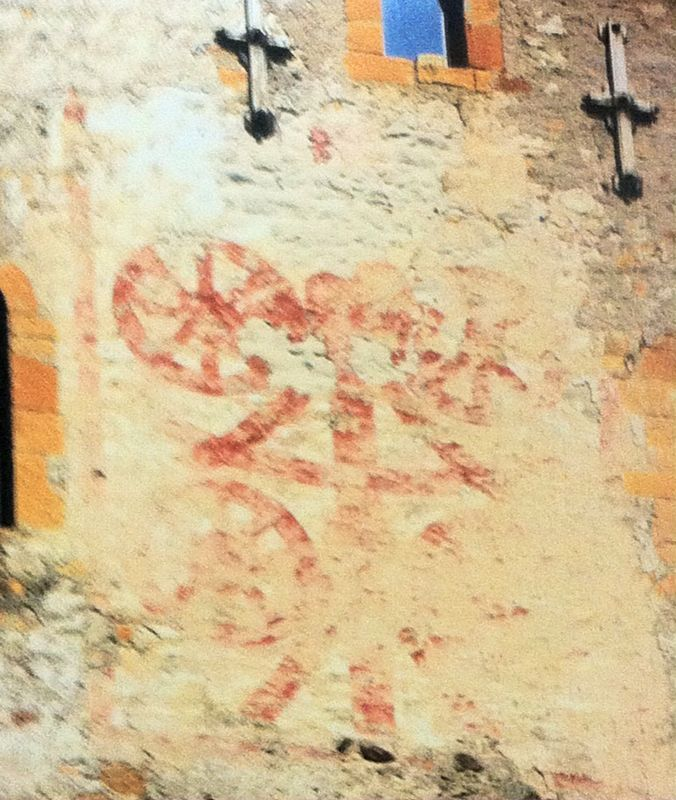 Stemma de Carrara al Castel Ivano.